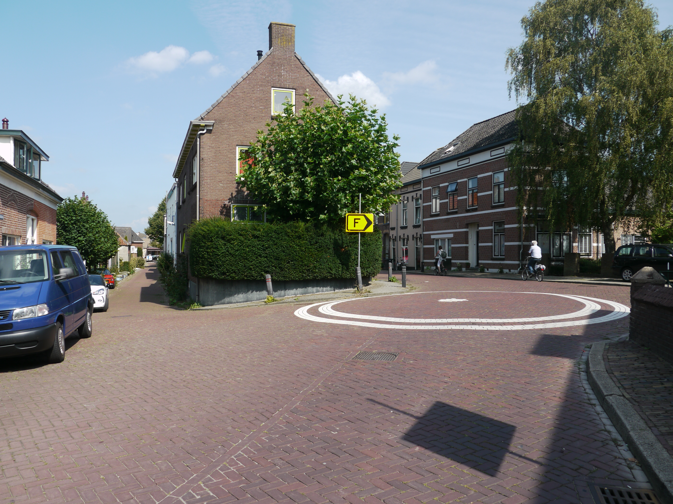 centraal pleintje in De Hoven (gemeente Zutphen): kruising Baankstraat - Oude Kanonsdijk - Oude Touwbaan